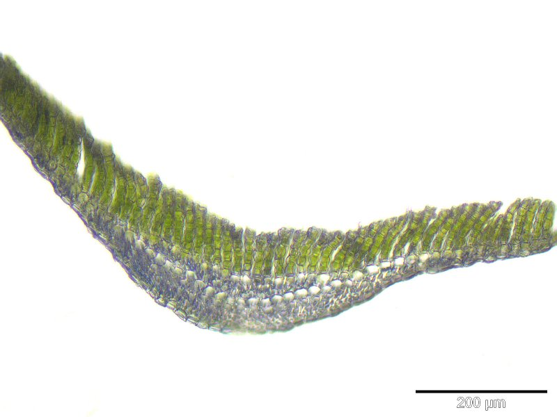 Goldenes Frauenhaar (Polytrichum commune), Blattquerschnitt, Vergrößerung: 125x